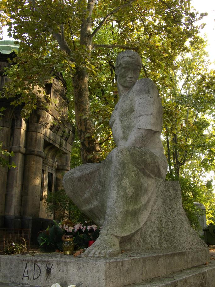 Ady Endre sírja a Kerepesi temetőben (Csorba Géza alkotása) Saját kép.